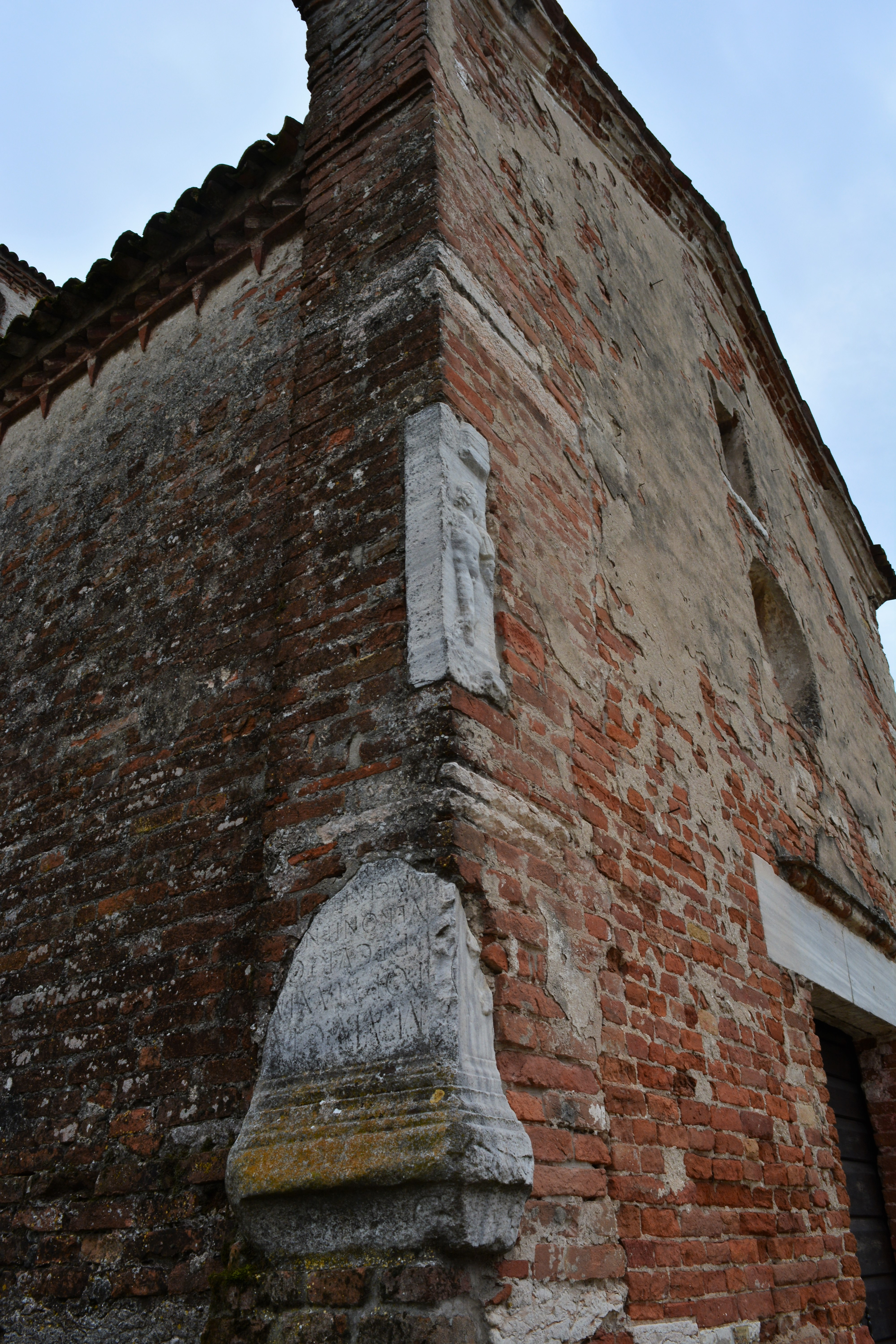 Il putto e un'iscrizione